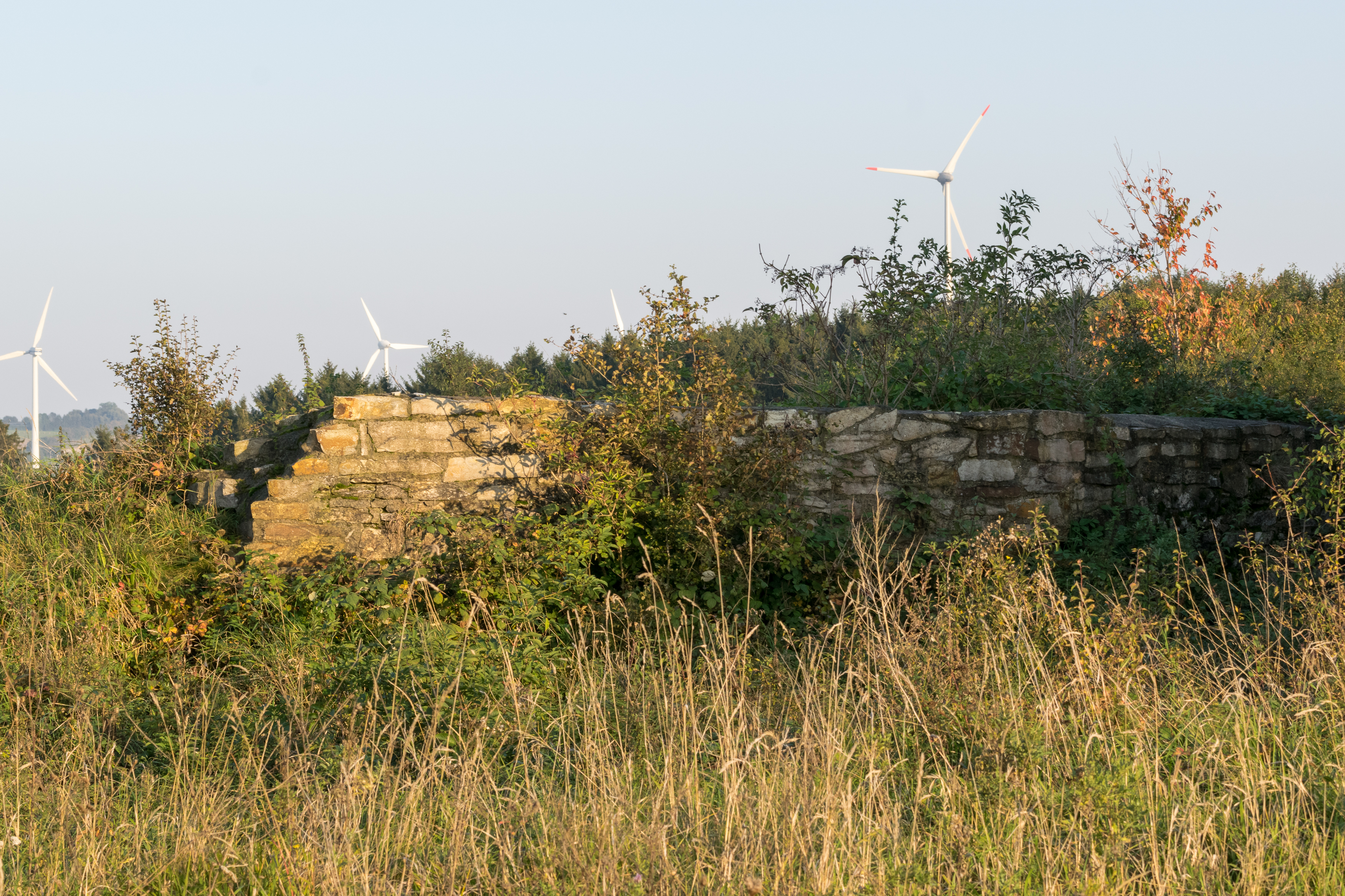 Mauerreste der Pamelschen Warte in Paderborn-Dahl